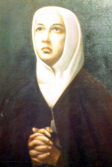 Ritratto di Anna Lapini conservato nell'Istituto "La Fantina" di Firenze, 1880 ca.